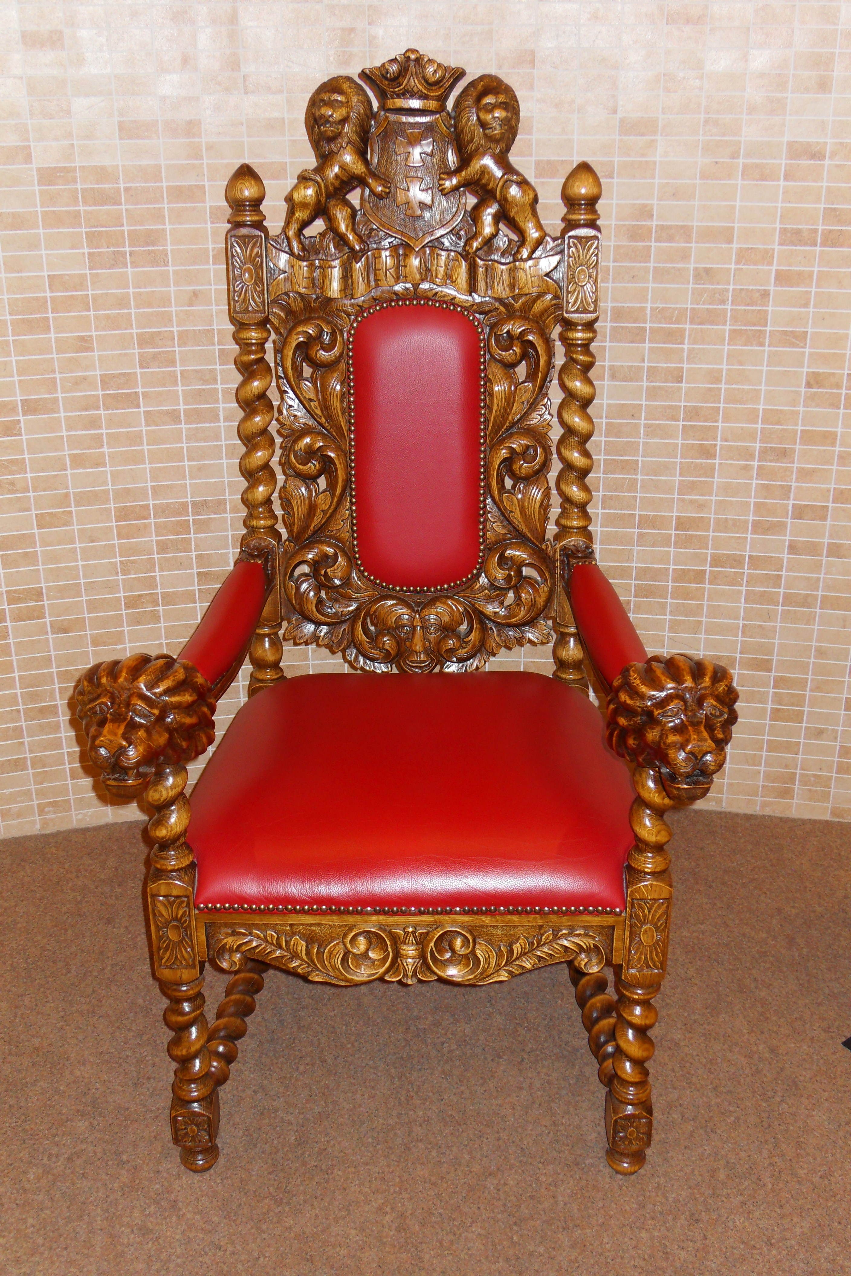 Gdańsk, fotel gdański.